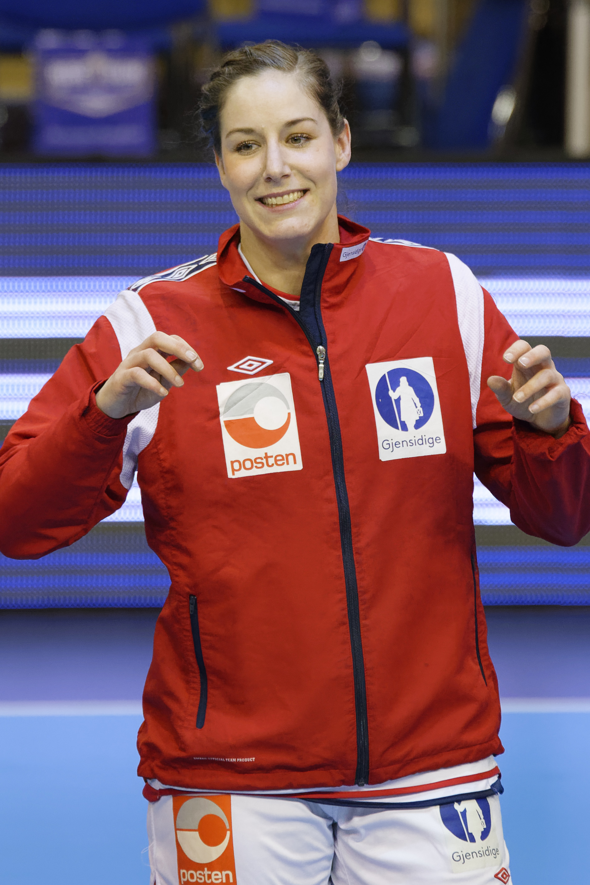 Betina Riegelhuth, arrière droite de l'équipe de Norvège de handball féminin. Le 19 mars 2015 lors du match Norvège / Pologne.